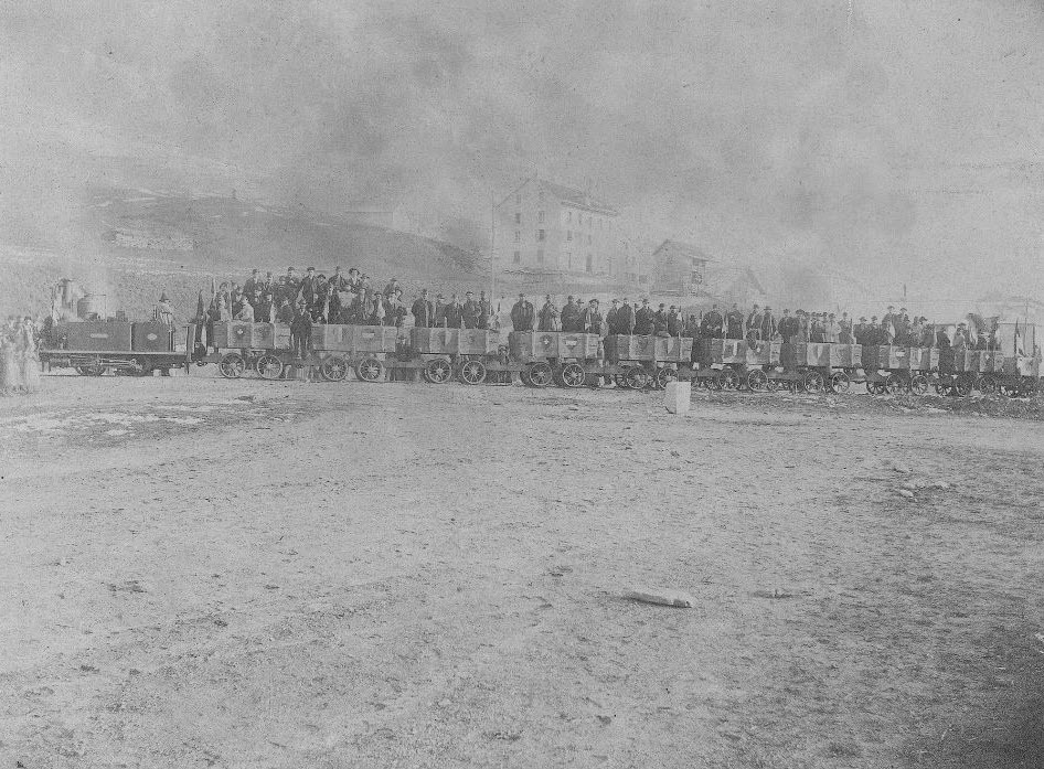 Erster Zug durch den Gotthardtunnel in Richtung Norden im Jahre 1881. Er benötigte für die 15 Kilometer rund 50 Minuten.